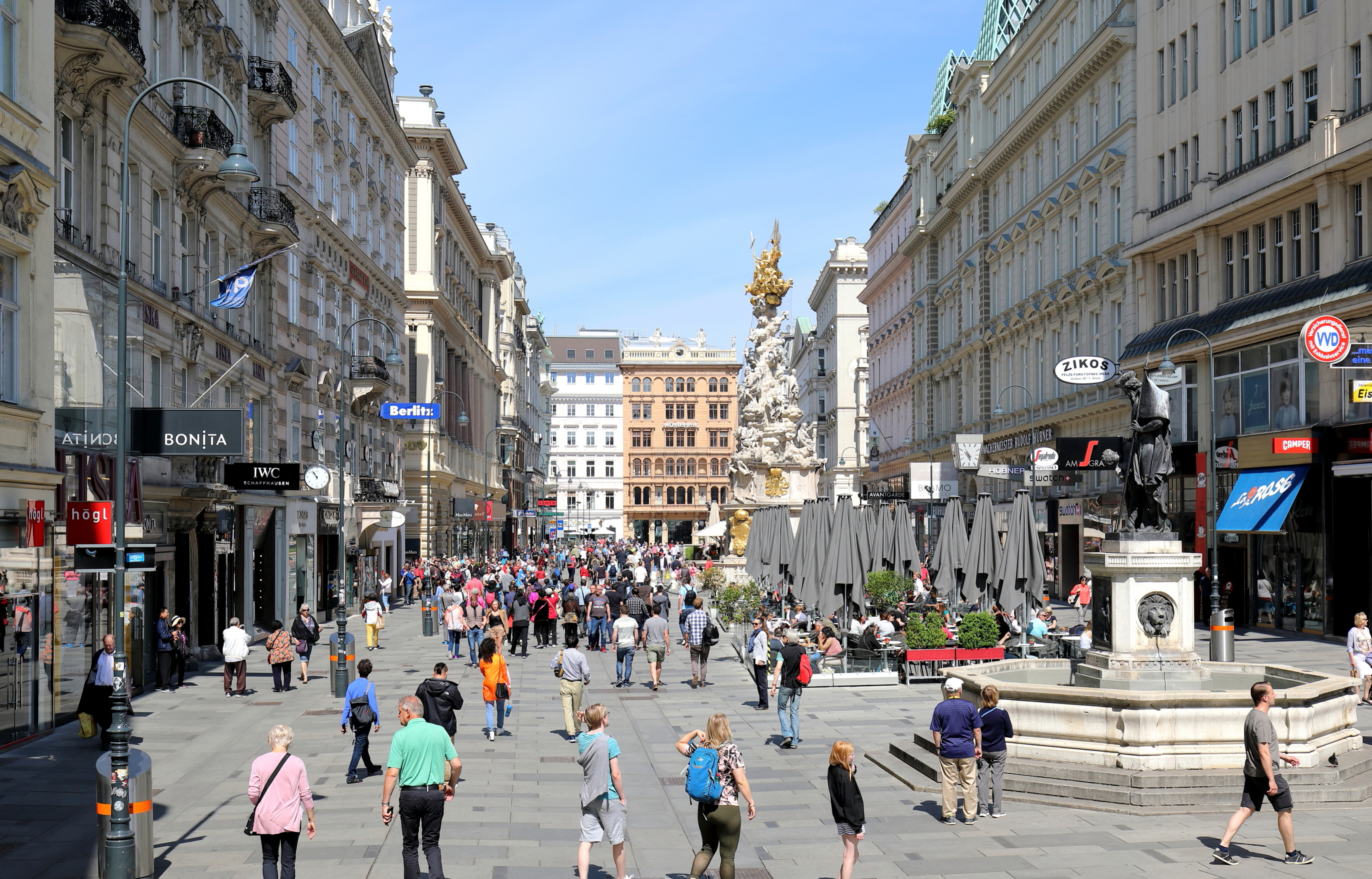 Die Prachtstrasse Graben im 1. Wiener Gemeindebezirk Innere Stadt mit der 1679 gestifteten Dreifaltigkeitssäule (Pestsäule) und dem Josefsbrunnen im Vordergrund. Der Graben wird 1294 erstmals urkundlich als Verkehrsfläche erwähnt und 1300 erstmals als Marktplatz bezeichnet. 1971 wurde erstmals in Wien an dem rund 250 Meter langen Straßenzug probeweise die Fußgängerzone eingeführt.